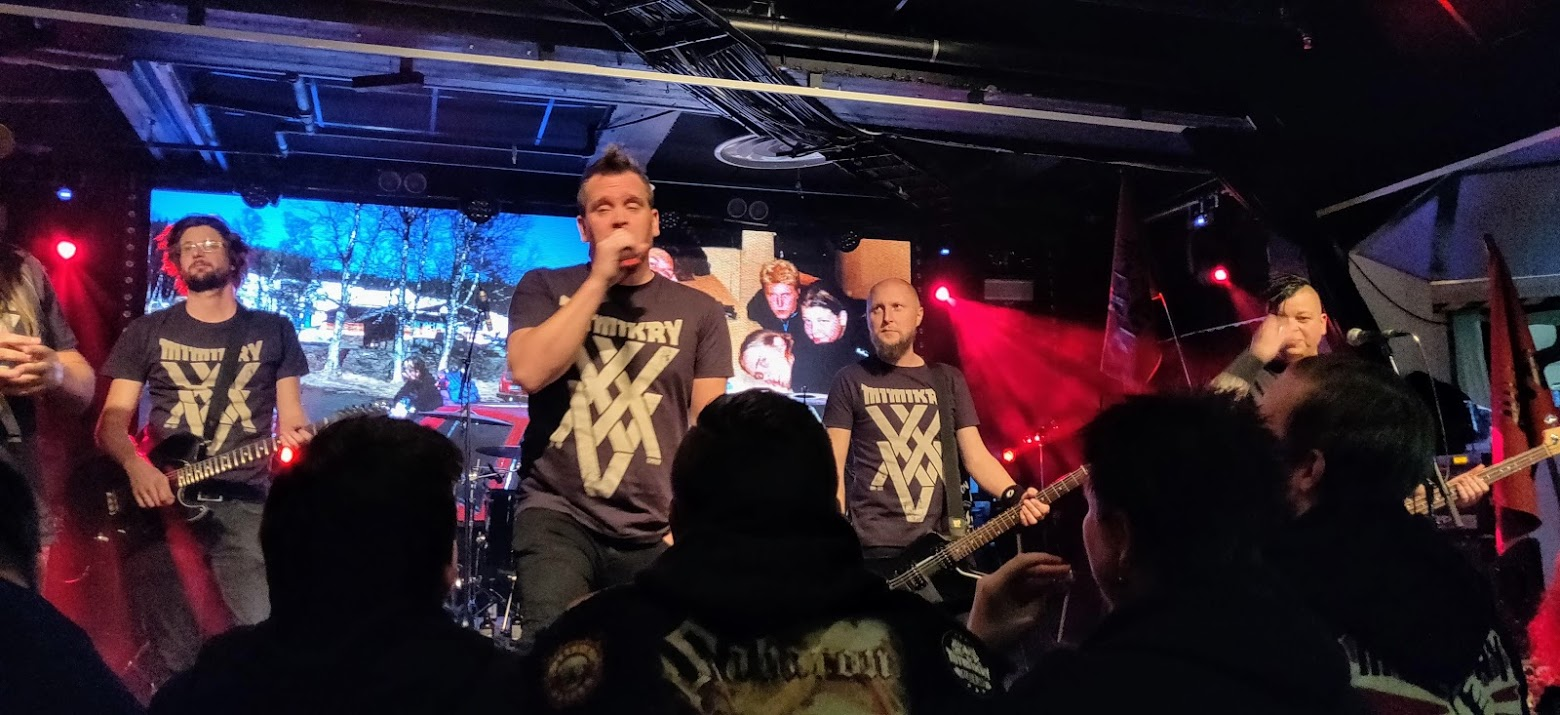 Punkbandet Mimikry uppträder under deras 25-årsfest på Liljan i Borlänge, 26 oktober 2019.